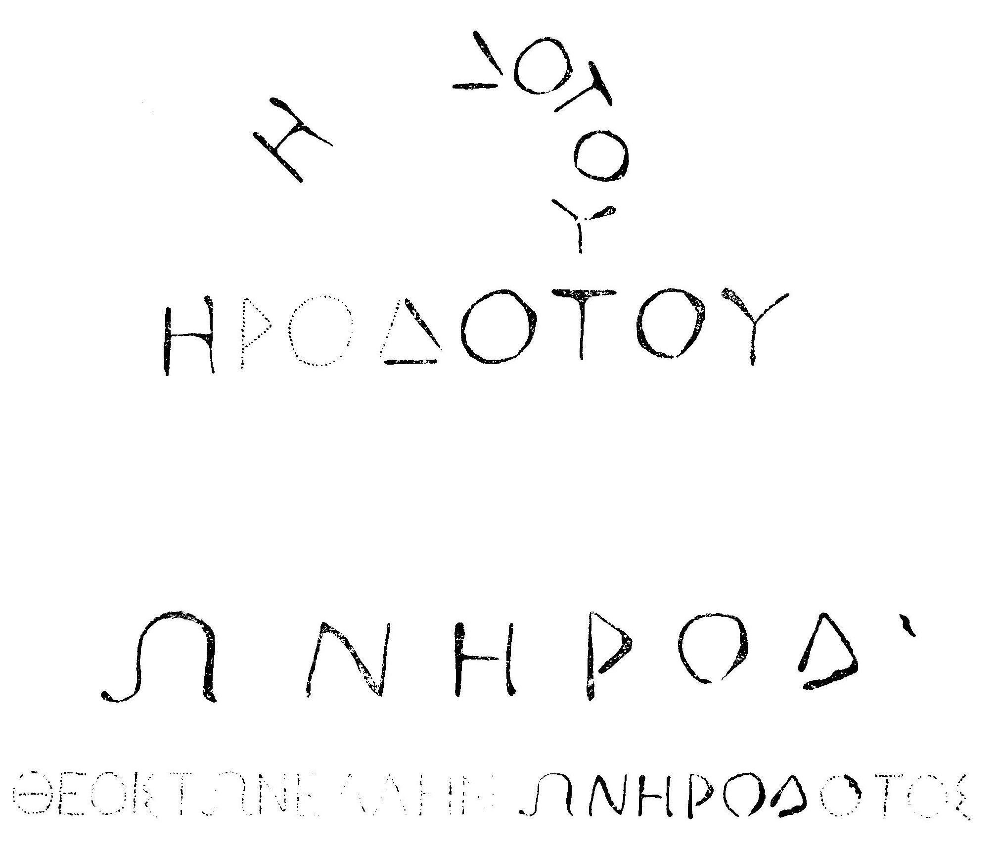 Herodotus_in_Naucratis.jpg